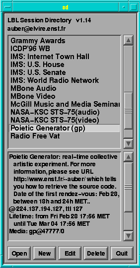 Copie d'écran du "session directory" (Lawrence Berkeley National Laboratory)